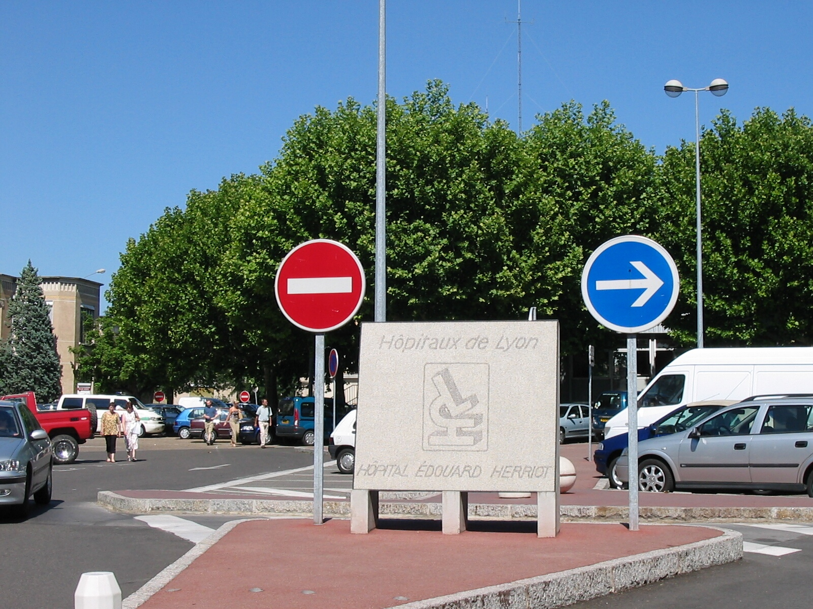 Le logo des Hospices civils de Lyon, qui symbolise un microscope, à l'entrée de l'hôpital Édouard Herriot